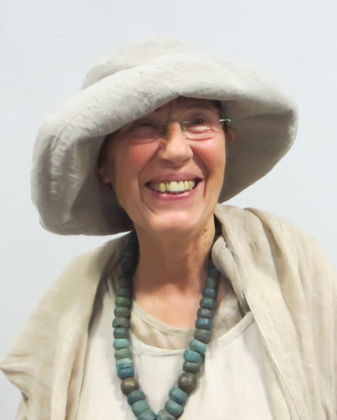 Christa Jeitner Während der Ausstellungseröffnung im Kunsthaus Dresden